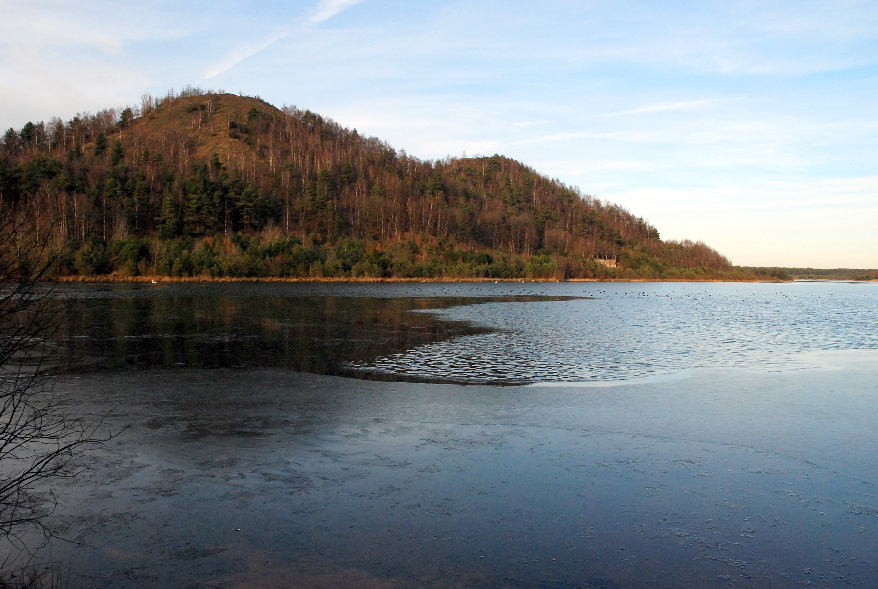 Het recreatiedomein Maasvallei te Lanklaar en Eisden, België